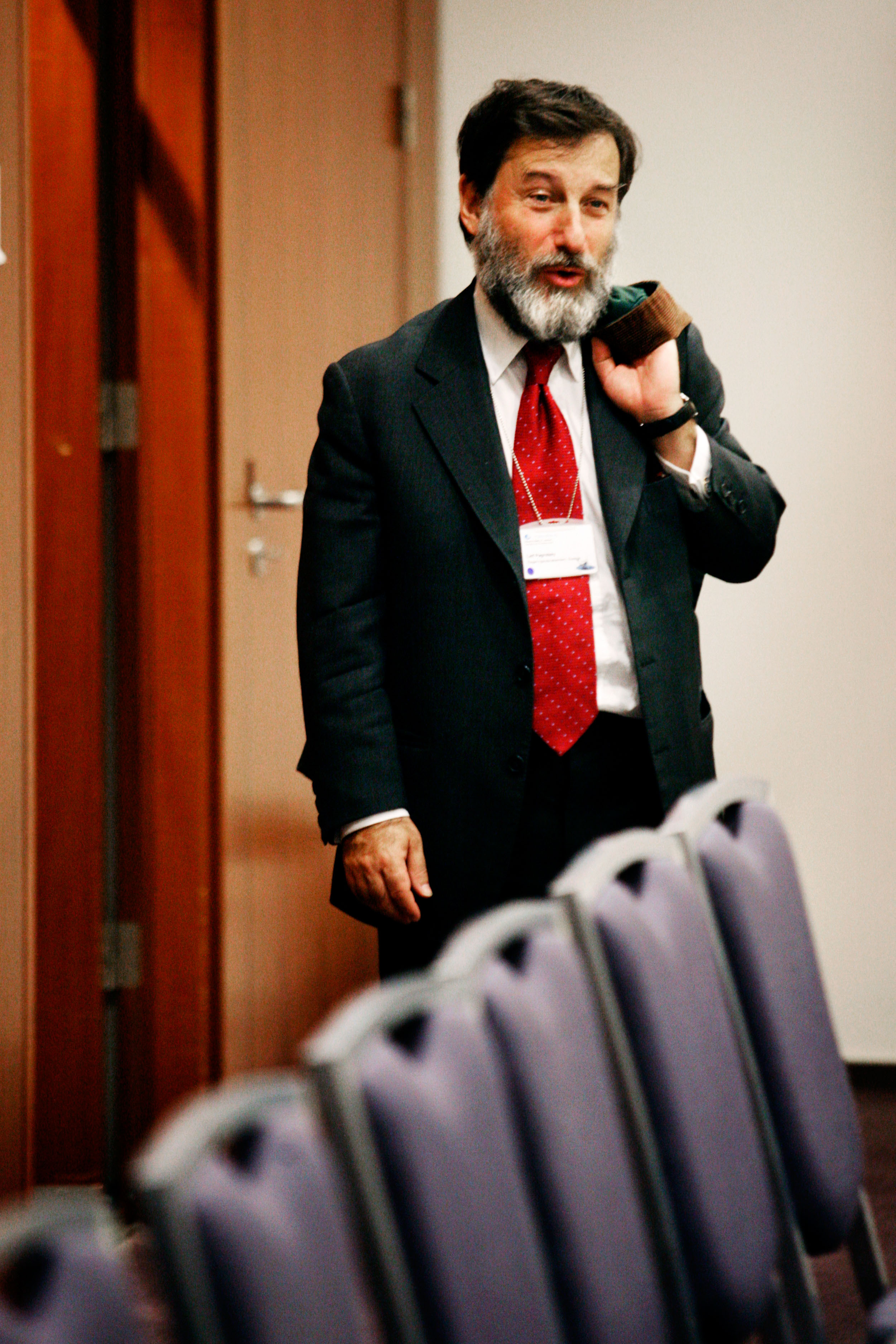 Leif Pagrotsky, kultur- och utbildninsminister Sverige.